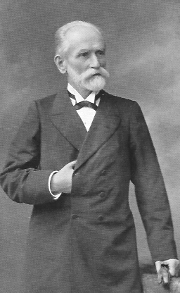 Johannes Versmann (1820 - 1899) war ein deutscher Politiker. Er war Erster Bürgermeister der Freien und Hansestadt Hamburg.